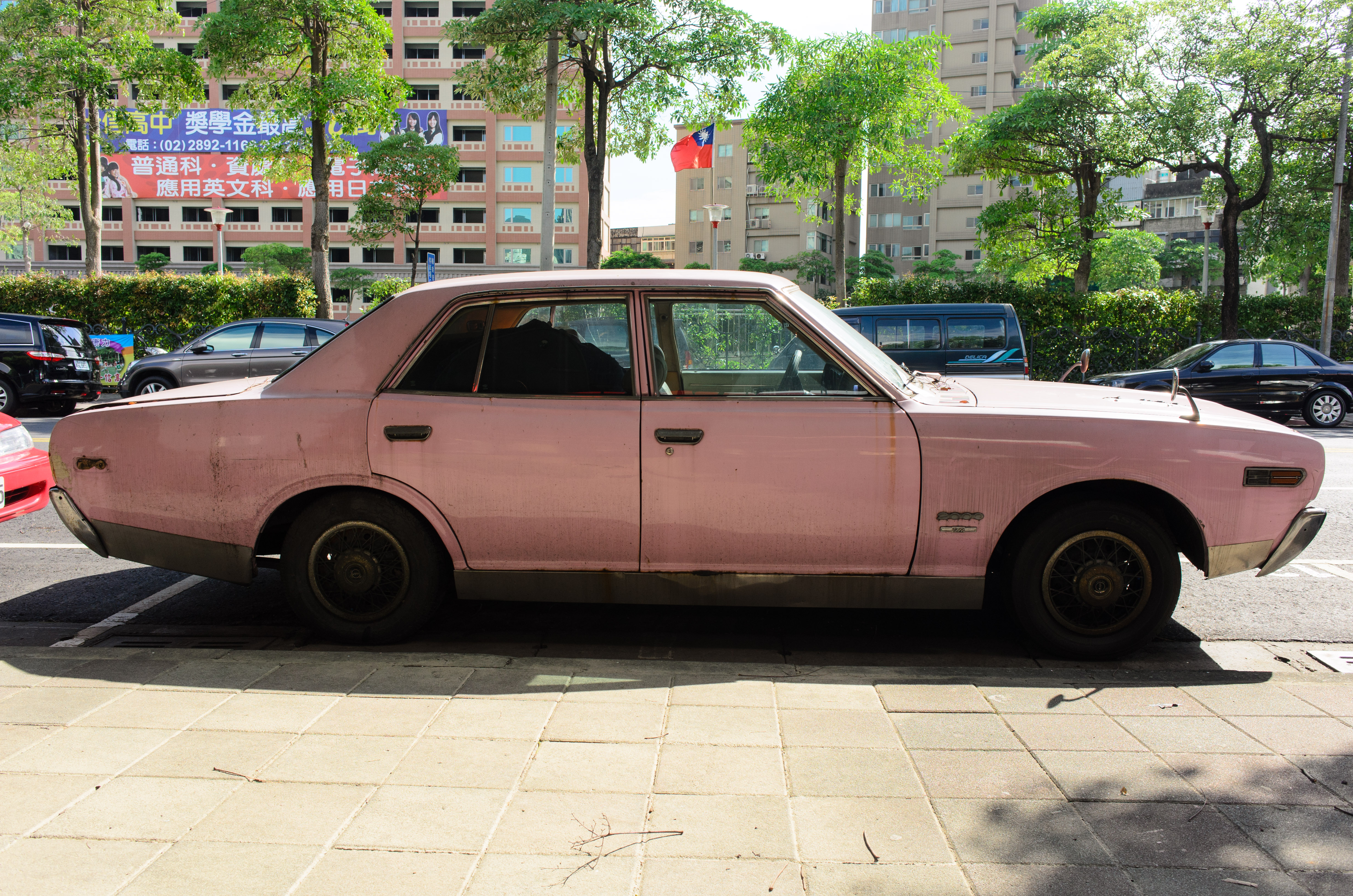 中文（台灣）: 裕隆勝利802右側，攝於臺北市北投區。